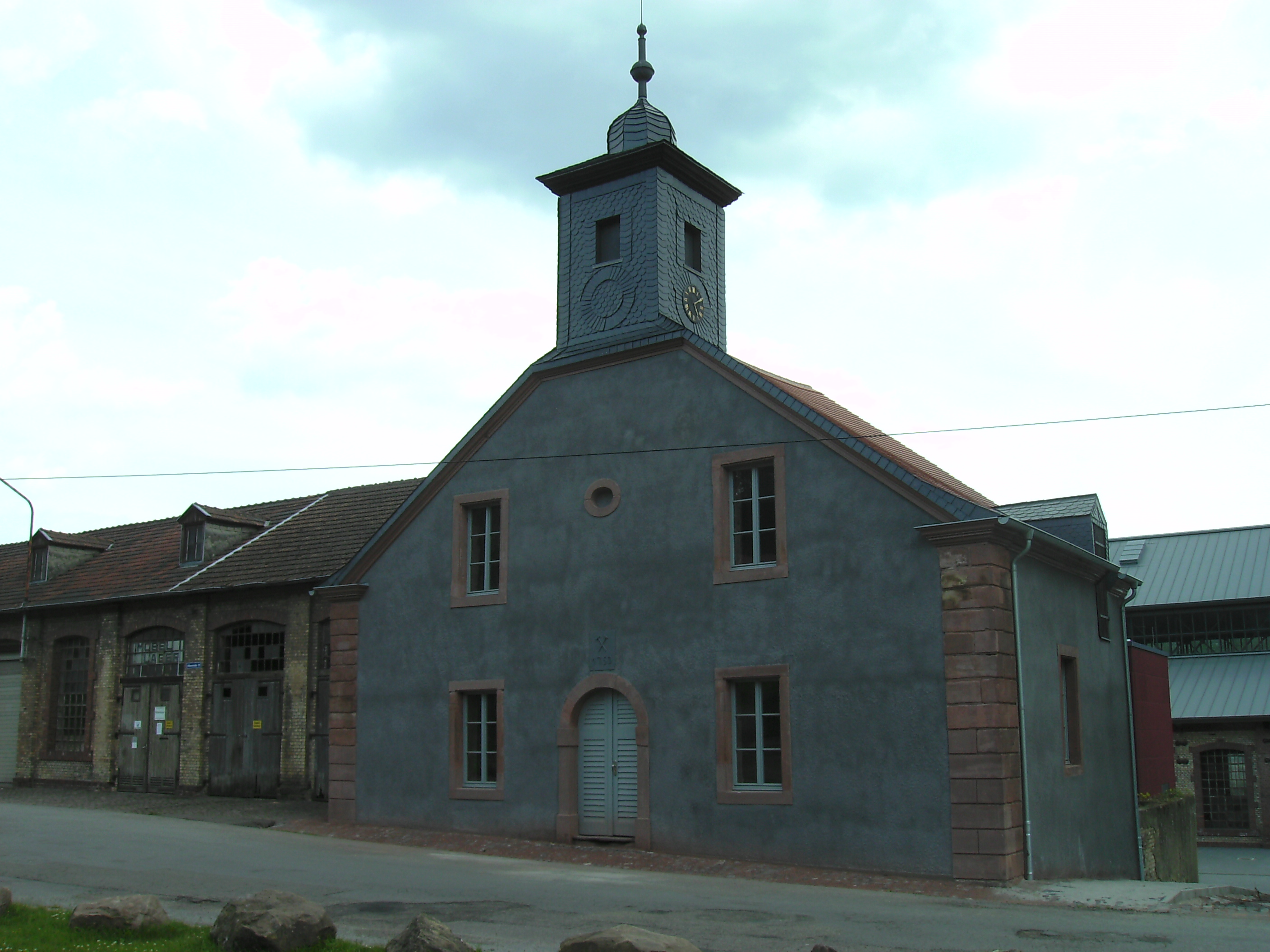 Alte Schmelz (St. Ingbert): renovierte "Möllerhalle"